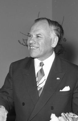 Bundestagspräsident Dr. Gerstenmaier erhält Orden vom mexikanischen Botschafter Alfonso Guerra (Ausschnitt Gerstenmaier)